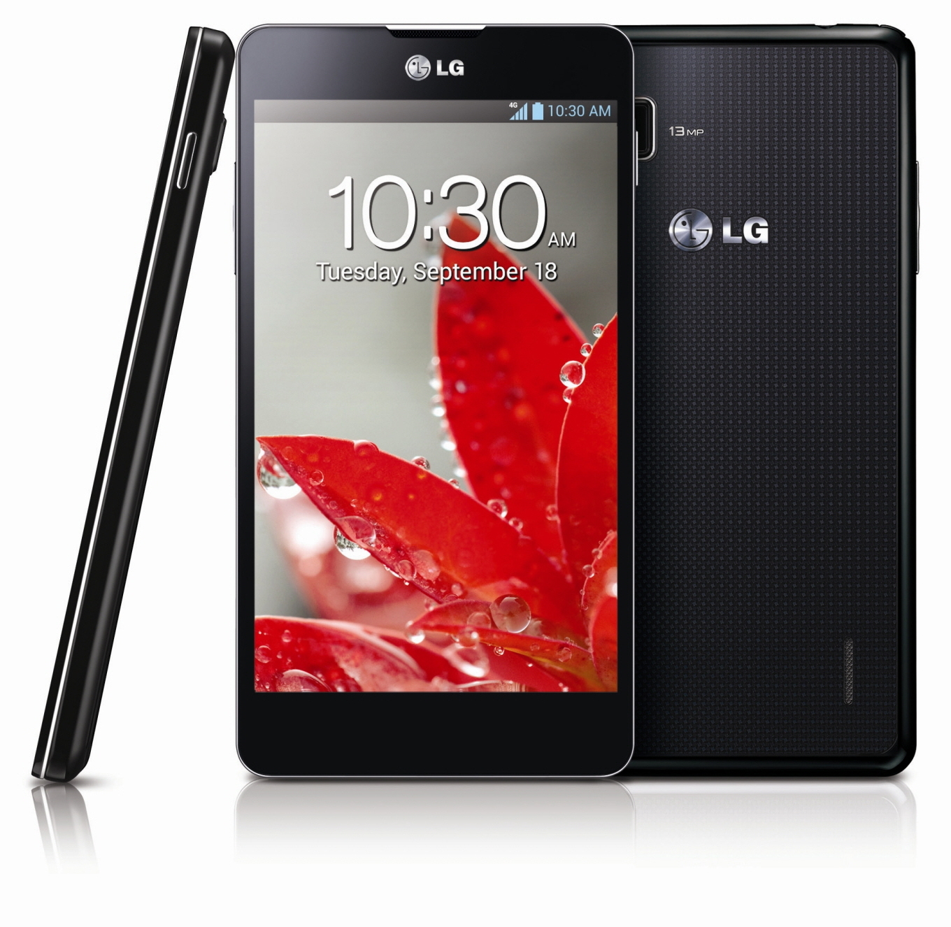 LG전자가 북미지역 탄소라벨 인증기관인 ‘카본 펀드(Carbon Fund)’로부터 옵티머스G, 올레드TV, 세탁기, 냉장고, 청소기, 모니터 등 6개 제품에 대해 탄소라벨인 ‘카본 프리(Carbon Free)’ 인증을 받았다.